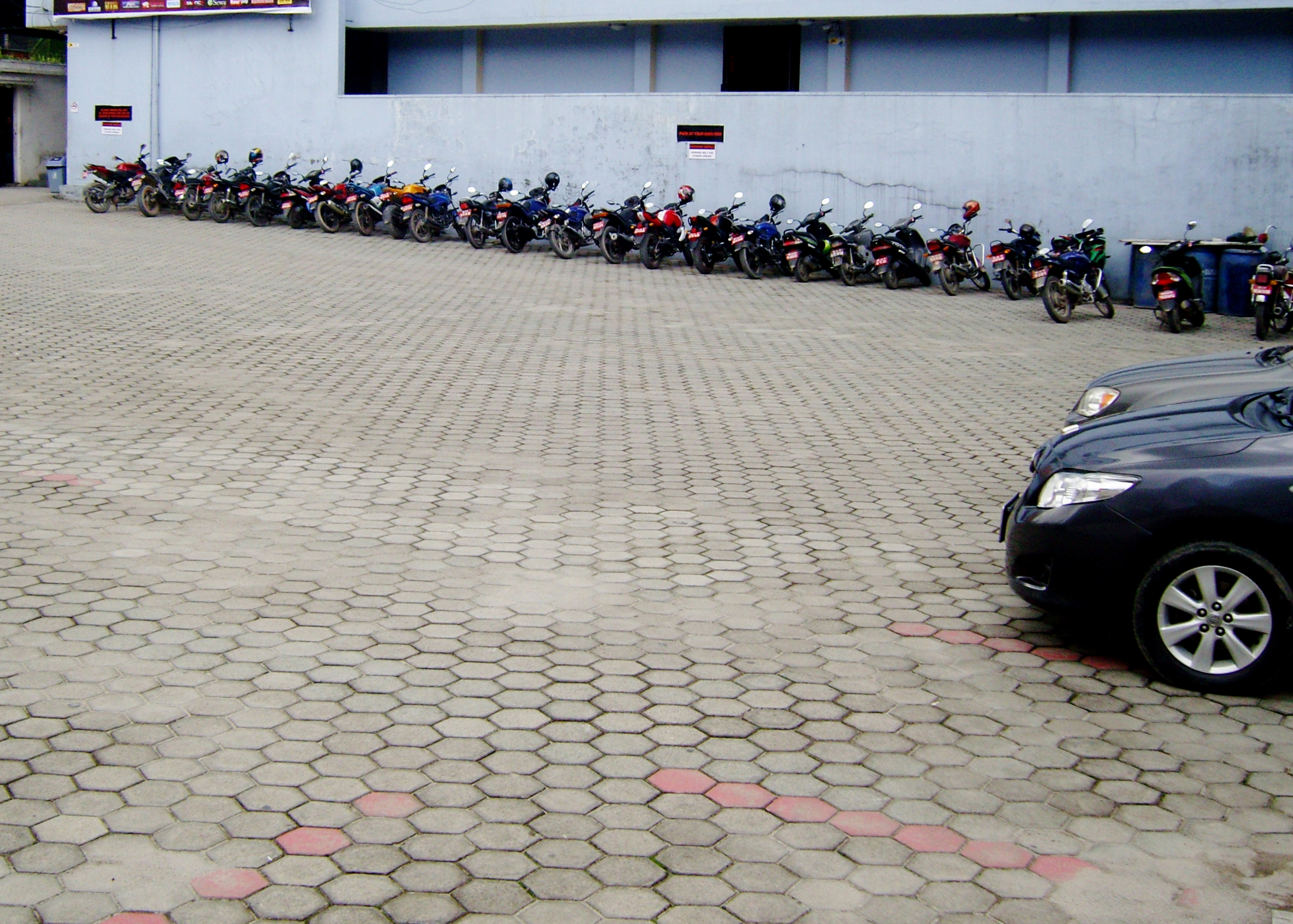 नेपाली: पार्किङ गरिने ठाउँ